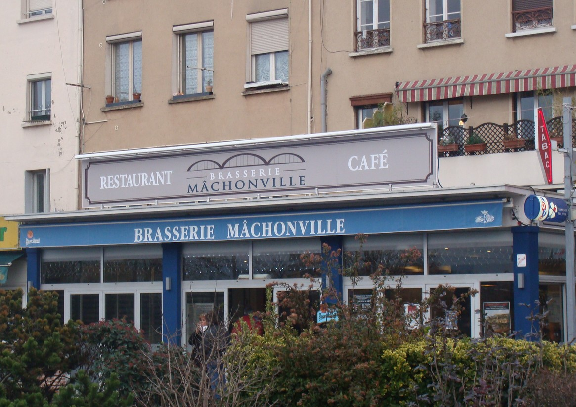 Enseigne d'une brasserie-café située sur le quai de Neuville-sur-Saône, inspirée du titre du film "Le charcutier de Mâchonville".